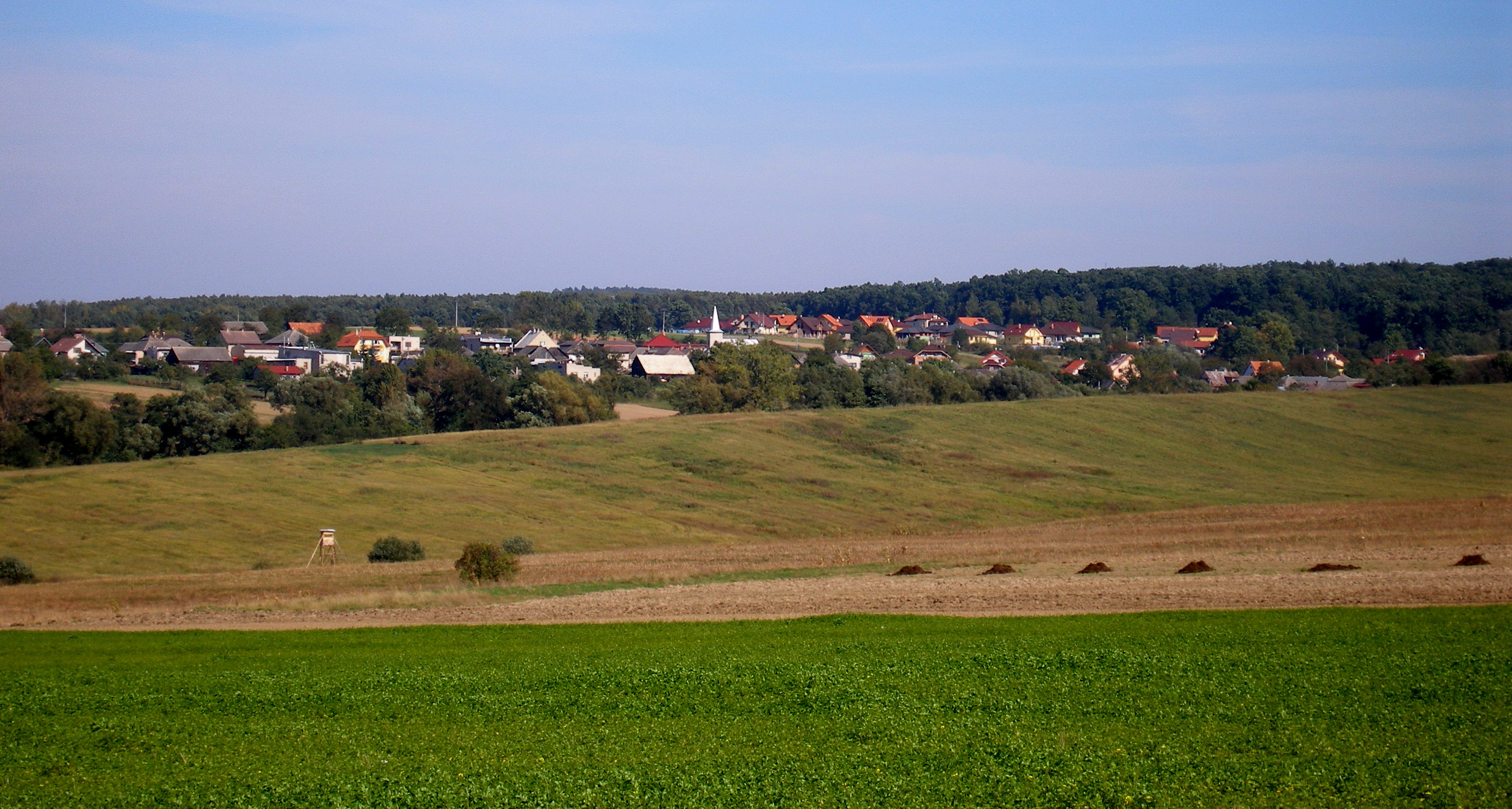 Obec Teriakovce okres Prešov región Šariš.